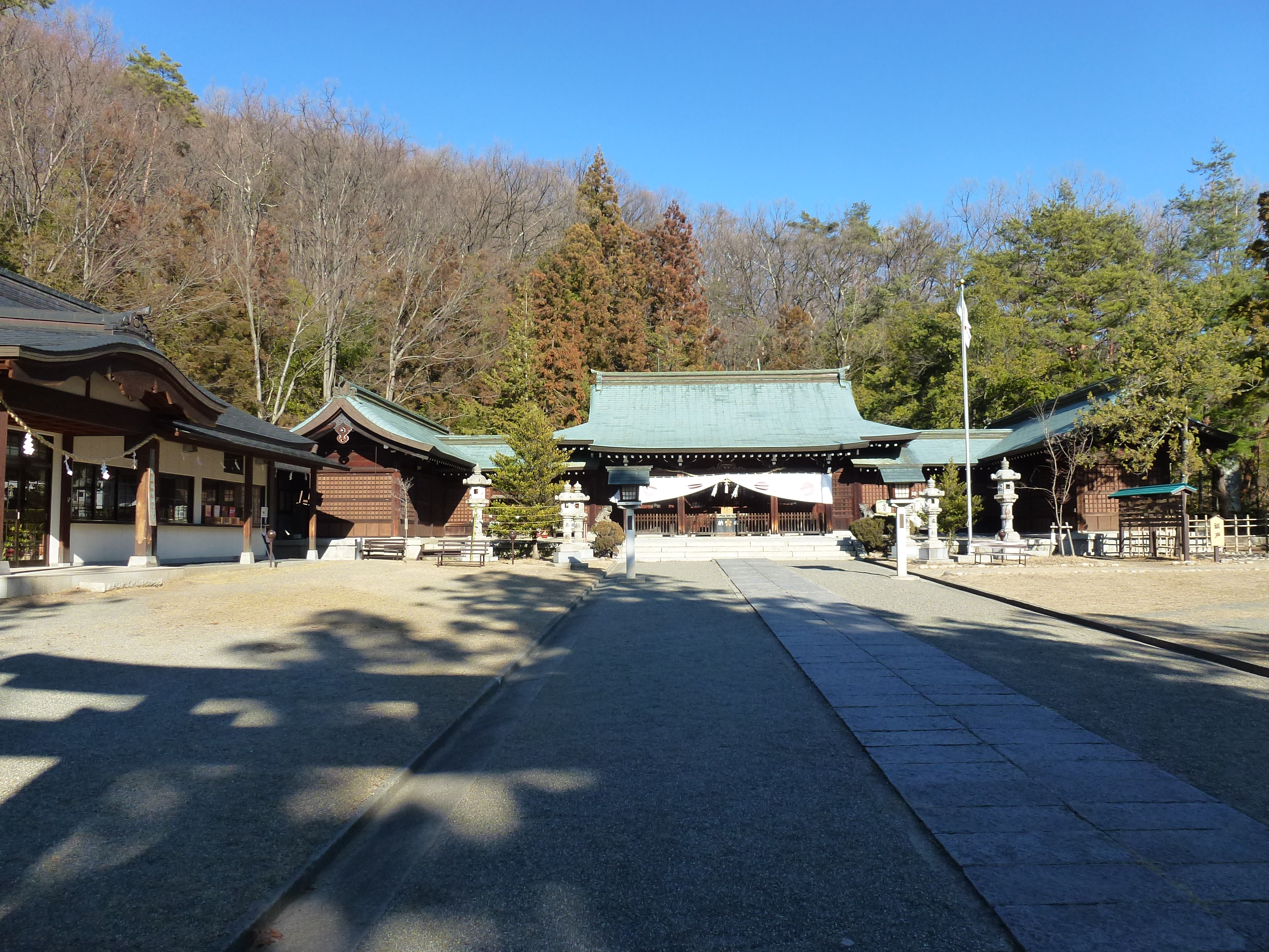 Innenhof mit den Hauptgebäuden, gegenüber Denkmäler und Gräber mit Bezug auf Kriege, die Japan geführt hat.